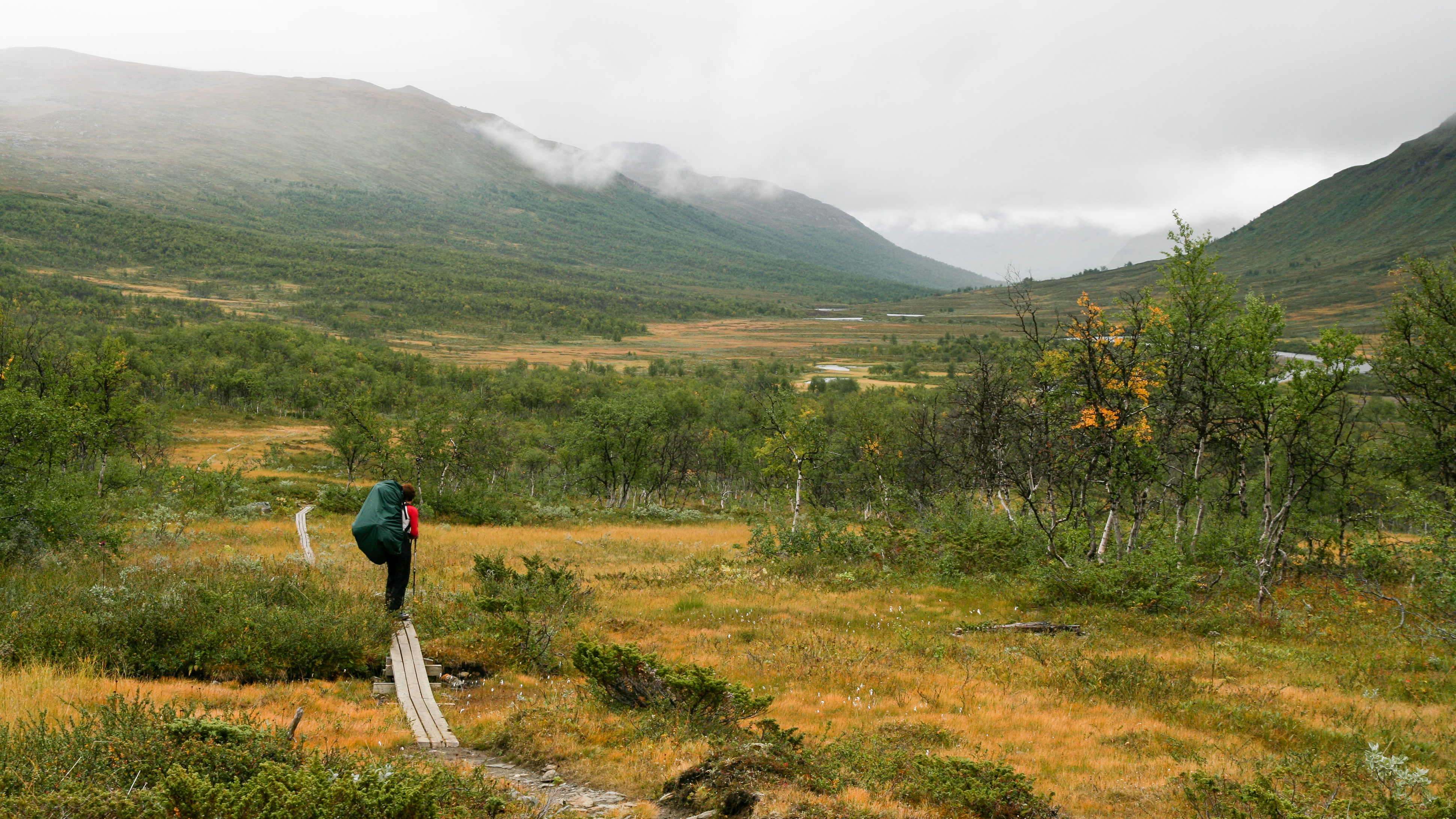 Padjelantaleden